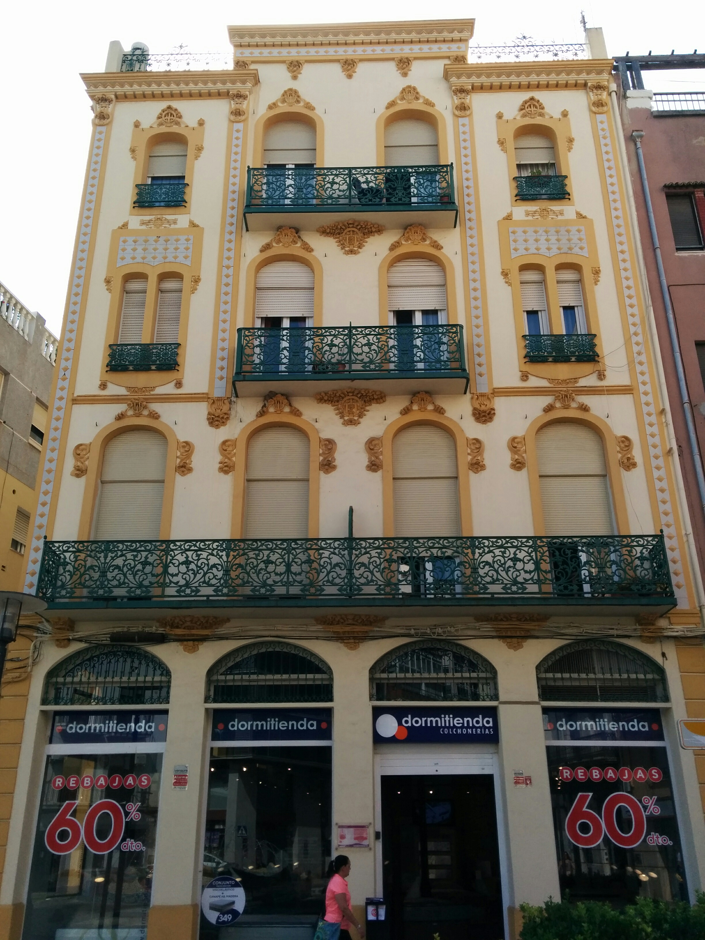 Casa Sendra, edificio modernista situado en la Plaça Jovellar número 8 de Vinaròs (Castellón).